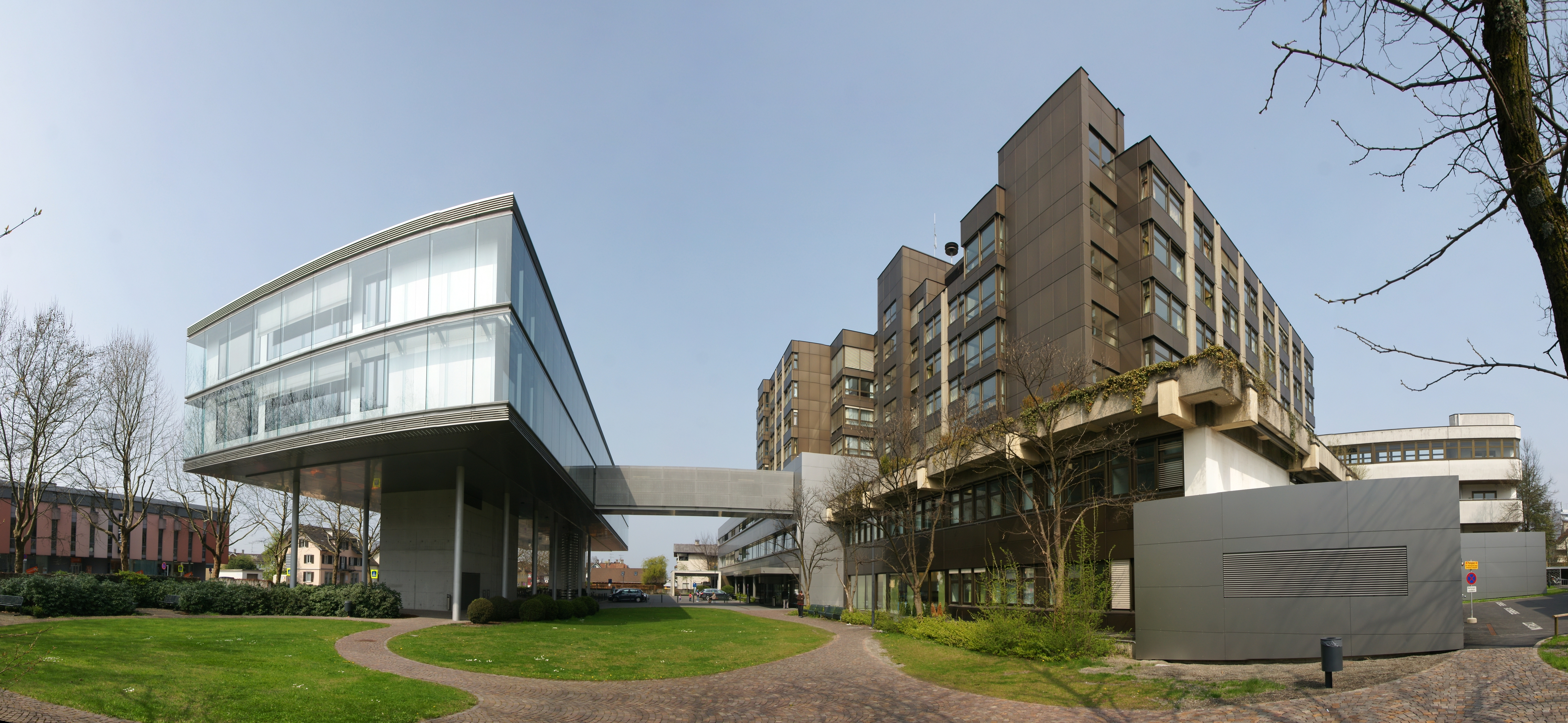 Am 1. Dezember im Jahr 1983 wurde das neue Krankenhaus der Stadt Dornbirn im Bezirk Hatlerdorf eröffnet. Links im Bild der Erweiterungsbau von Gohm & Hiessberger aus dem Jahr 2004.